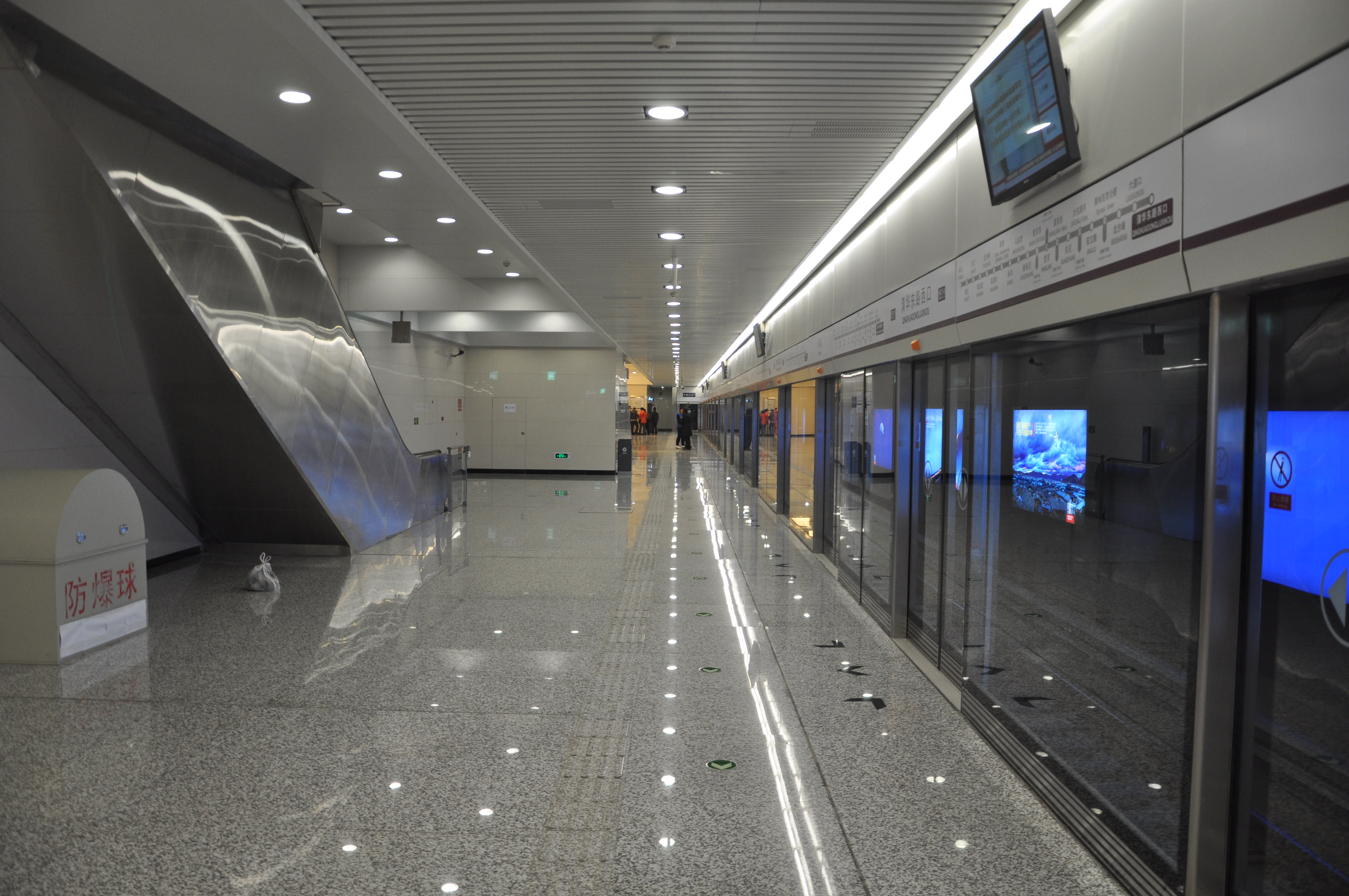 北京地铁15号线清华东路西口站站台